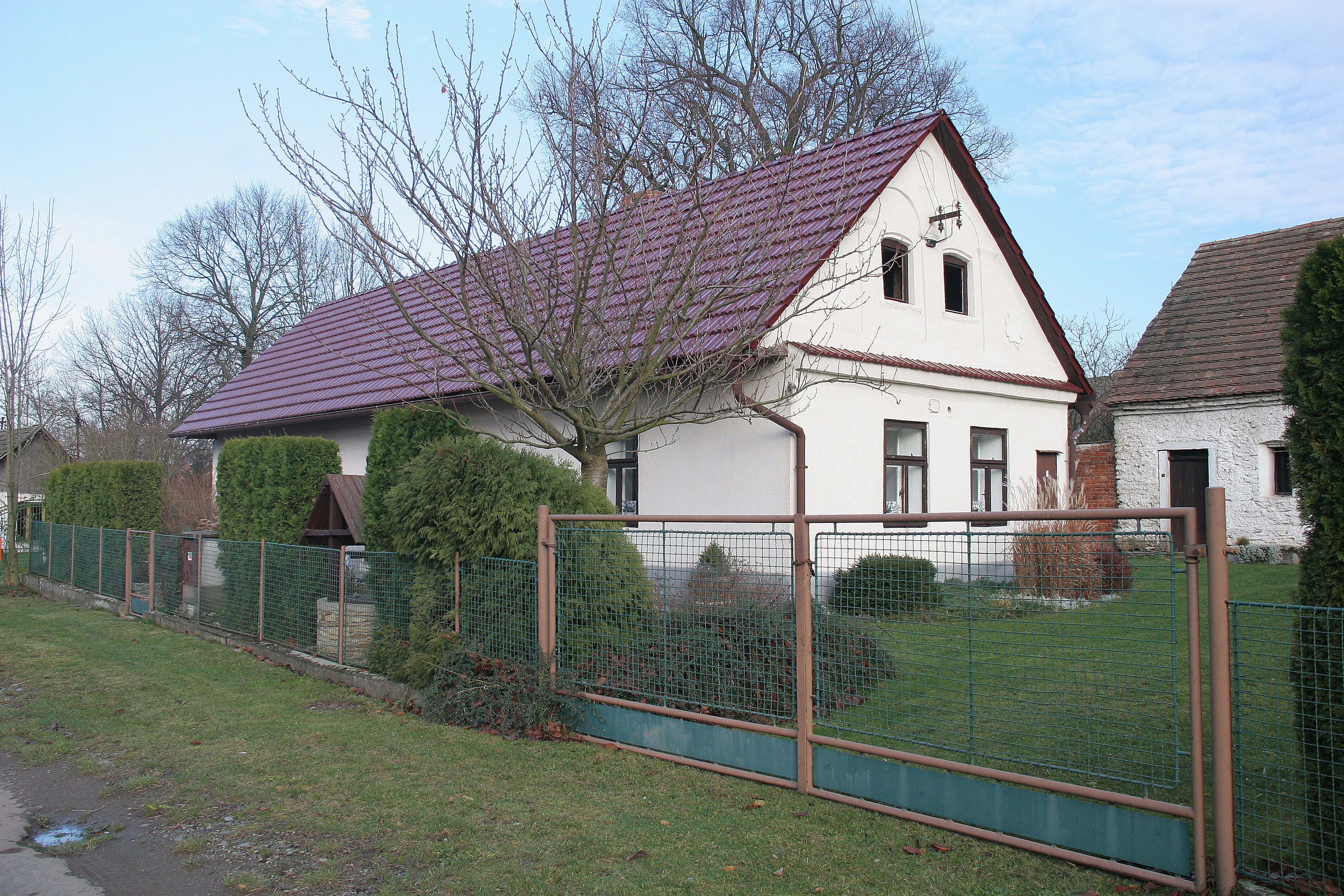 Újezdec čp 5